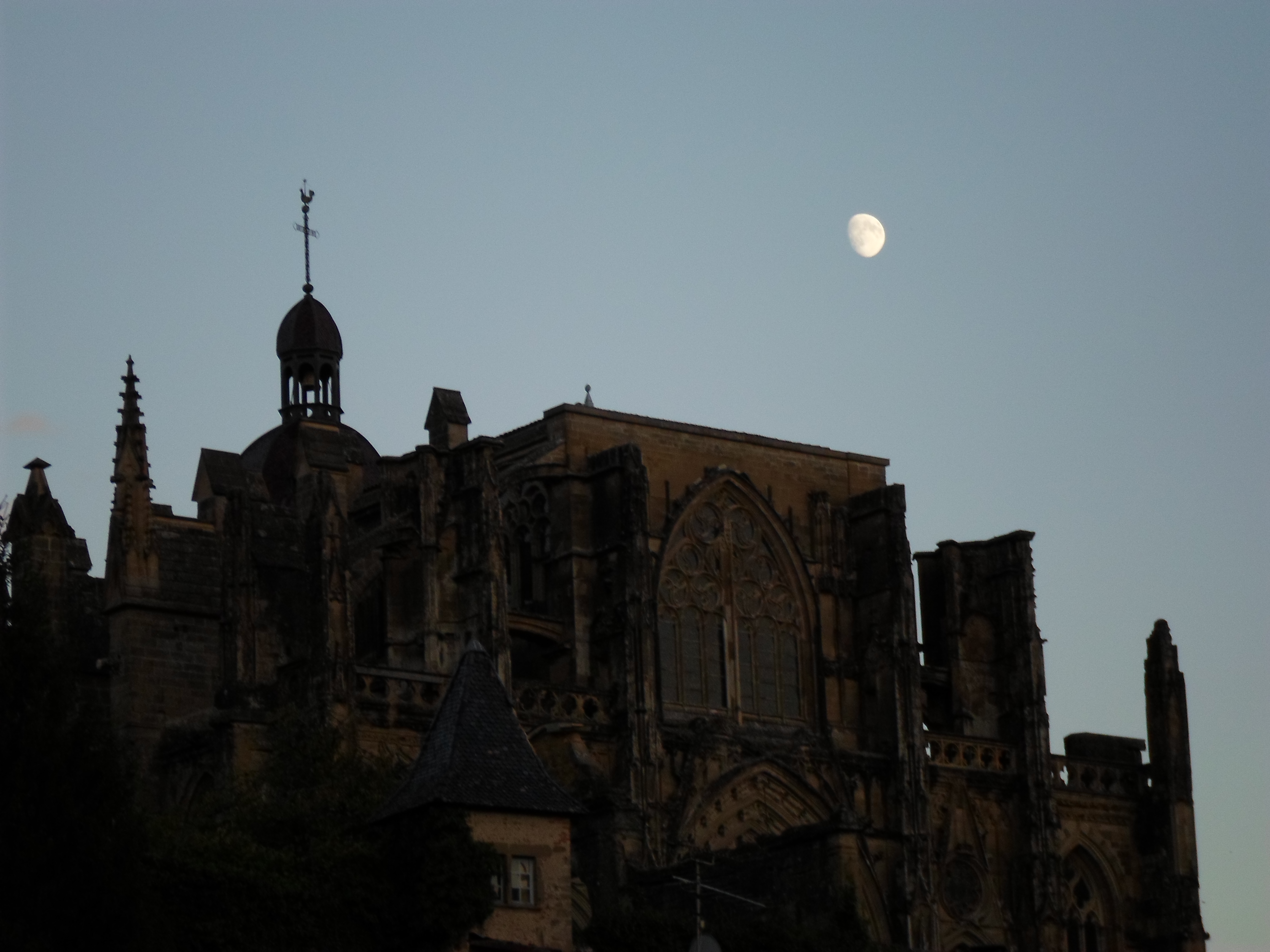 Église Notre-Dame de la Jayère Eglise Saint-Antoine-l'Abbaye by night 38160 PA38000020 VAN DEN HENDE ALAIN CC -BY-SA 4 0 050118 .